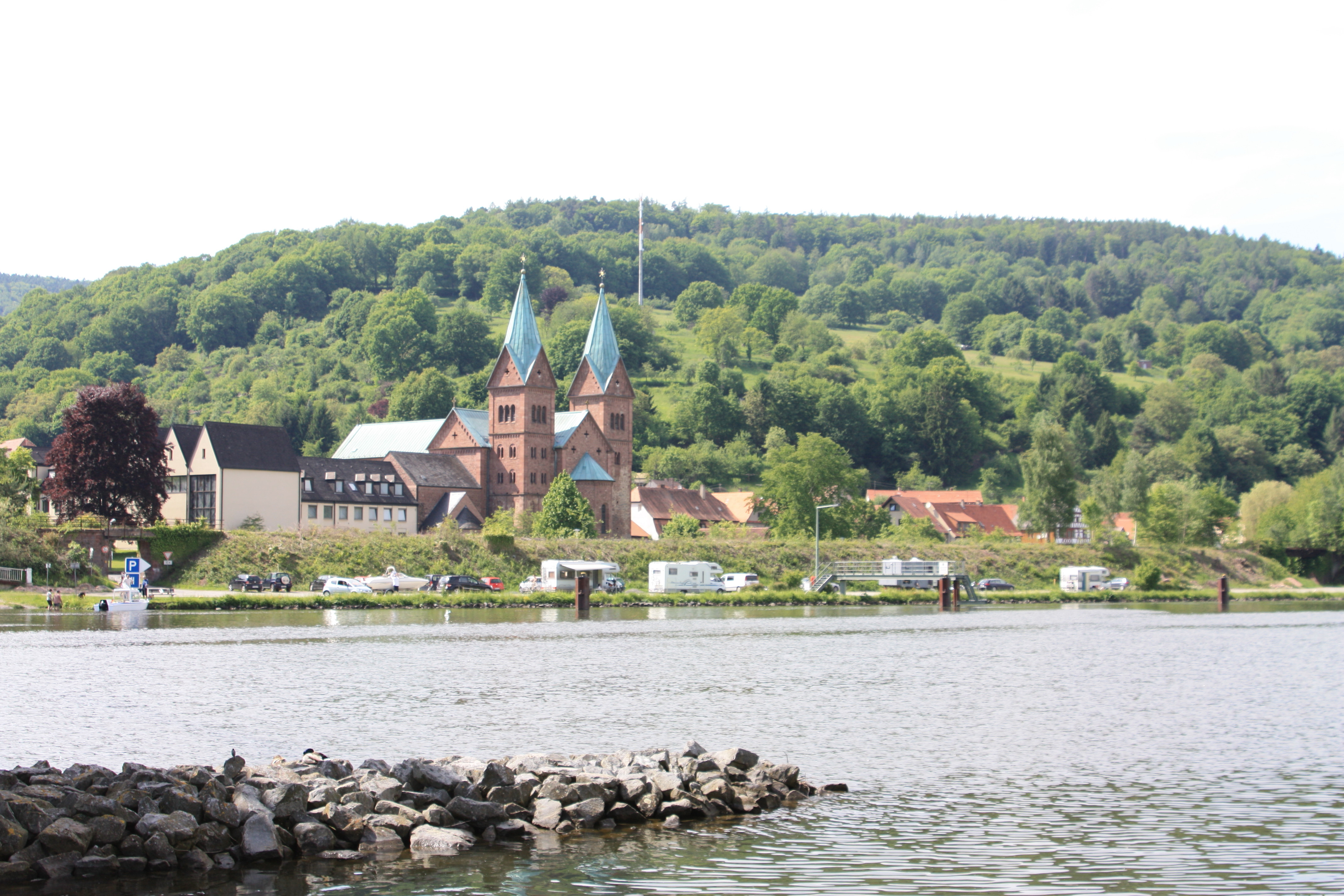 Neustadt am Main von Osten